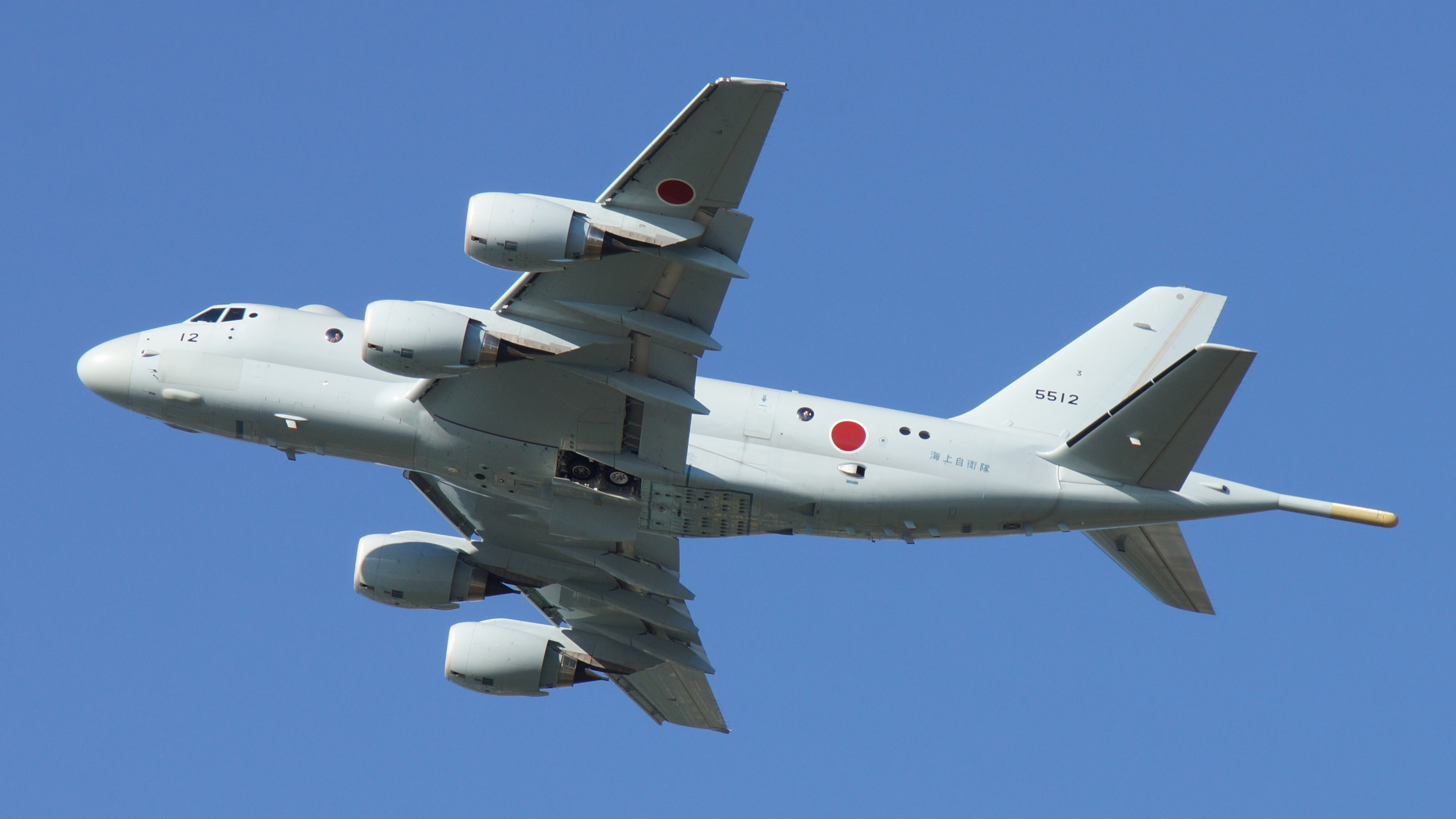 海上自衛隊 飛行するP-1哨戒機（5512号機）。2017年9月30日 徳島航空基地にて。